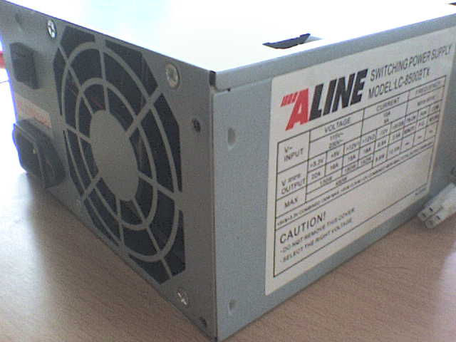 Захранване за компютър ALINE 480 вата.